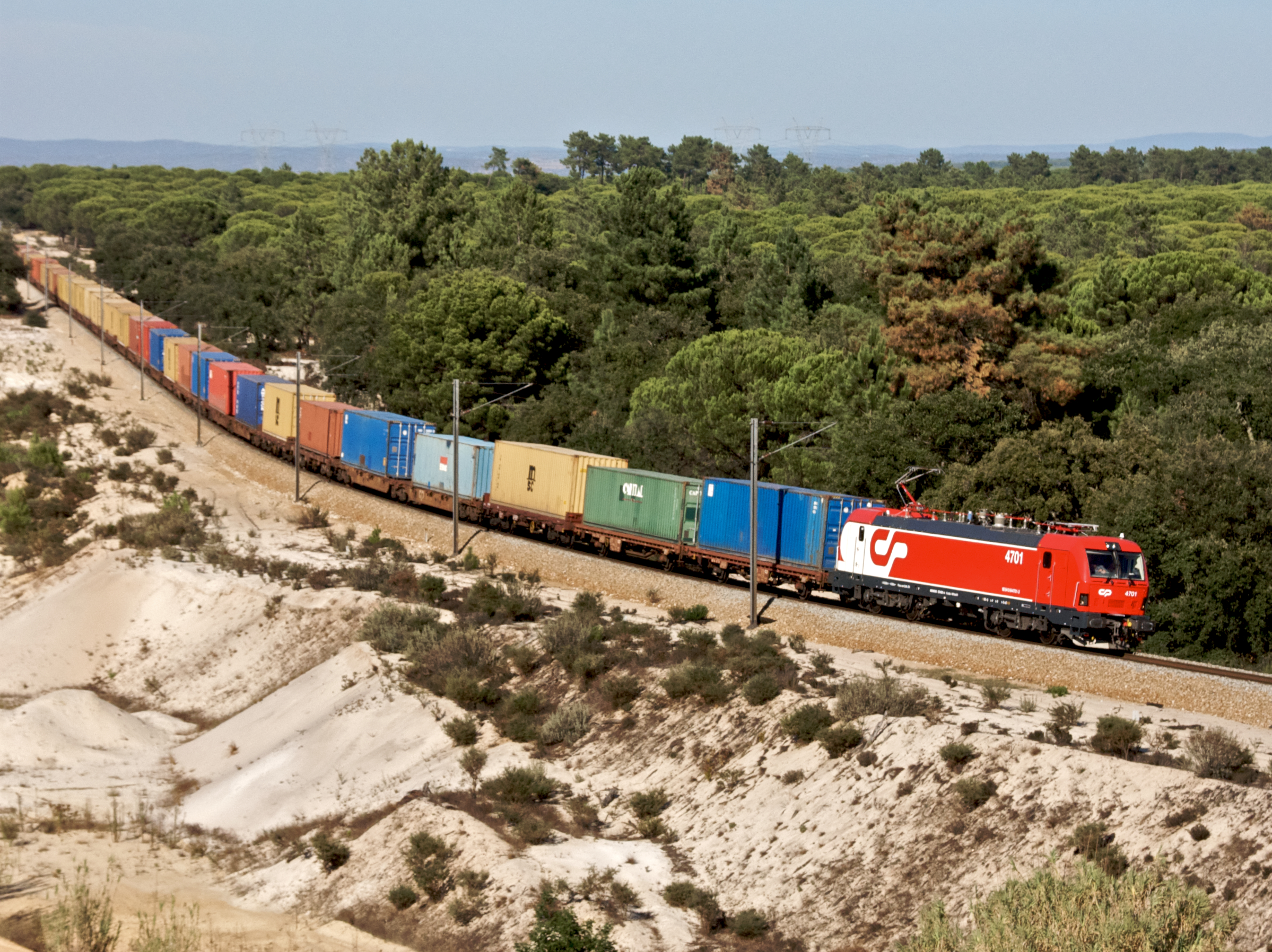 Tipo: Comboio de Transporte de Contentores 81381/0 [Bobadela - Sines] Local: Alcácer do Sal [Linha do Sul, PK 86] Data e hora: 2 de Outubro de 2008 [16h35] Material: Locomotiva 4701 + xx vagões CP Sggmrss e outros vídeo deste momento aqui. vídeo do regresso deste comboio aqui. esta fotografia foi publicada no . e um ano depois...